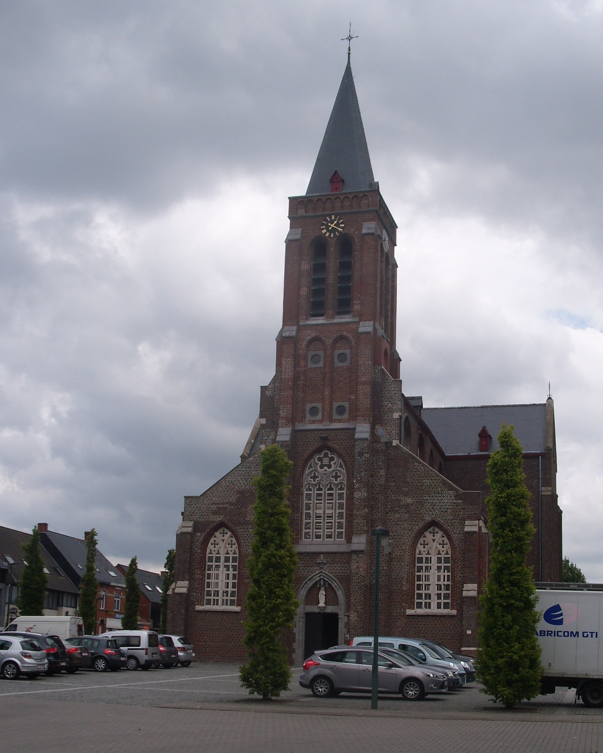 Sint-Germanuskerk - Egemdorpsplein - Egem - Pittem - West-Vlaanderen - Vlaams Gewest - België